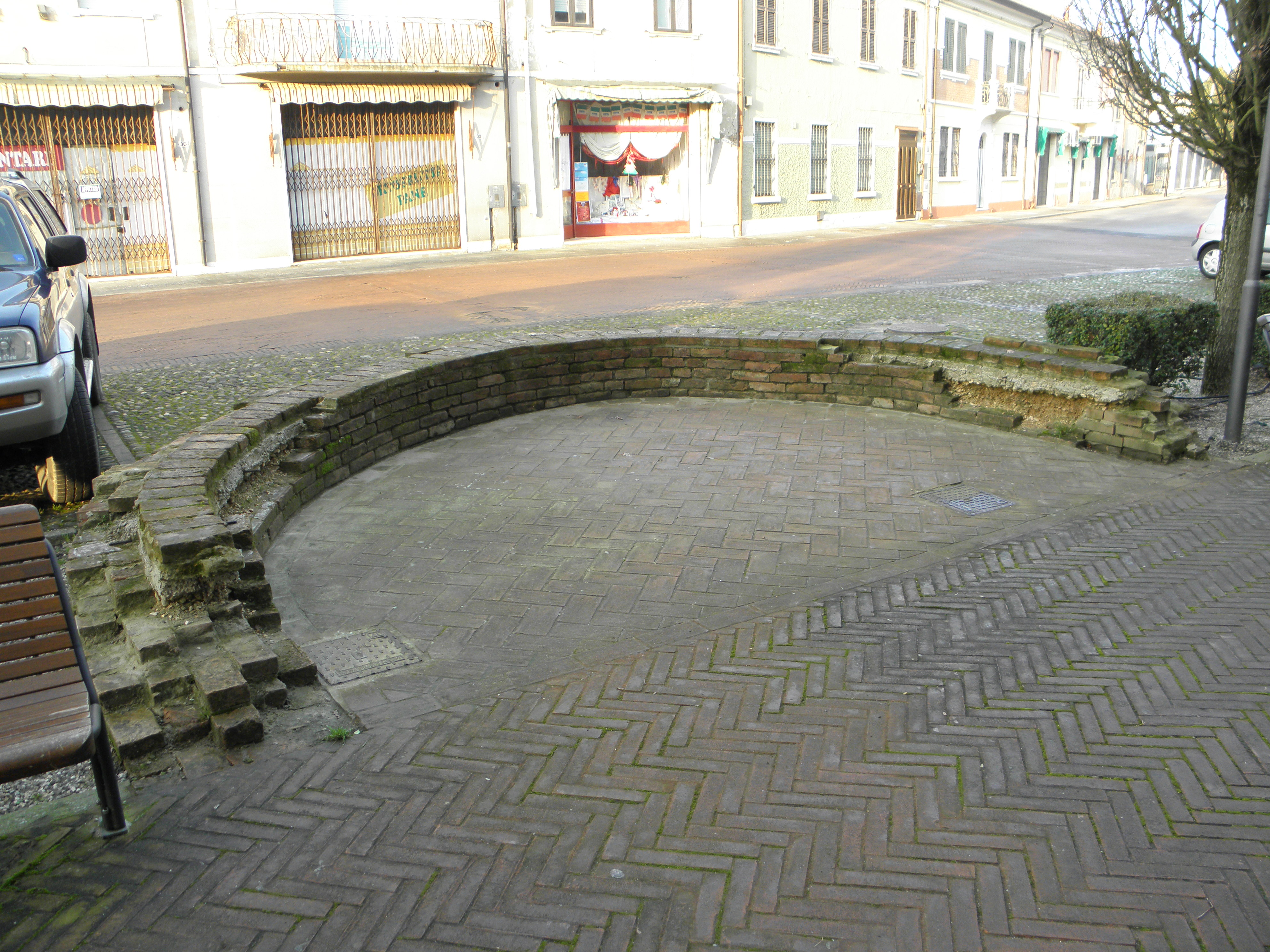 Massa Fiscaglia, già comune autonomo e ora frazione del comune di Fiscaglia: resti (absidali) della precedente chiesa su cui è edificata la settecentesca chiesa dei Santi Pietro e Giacomo.